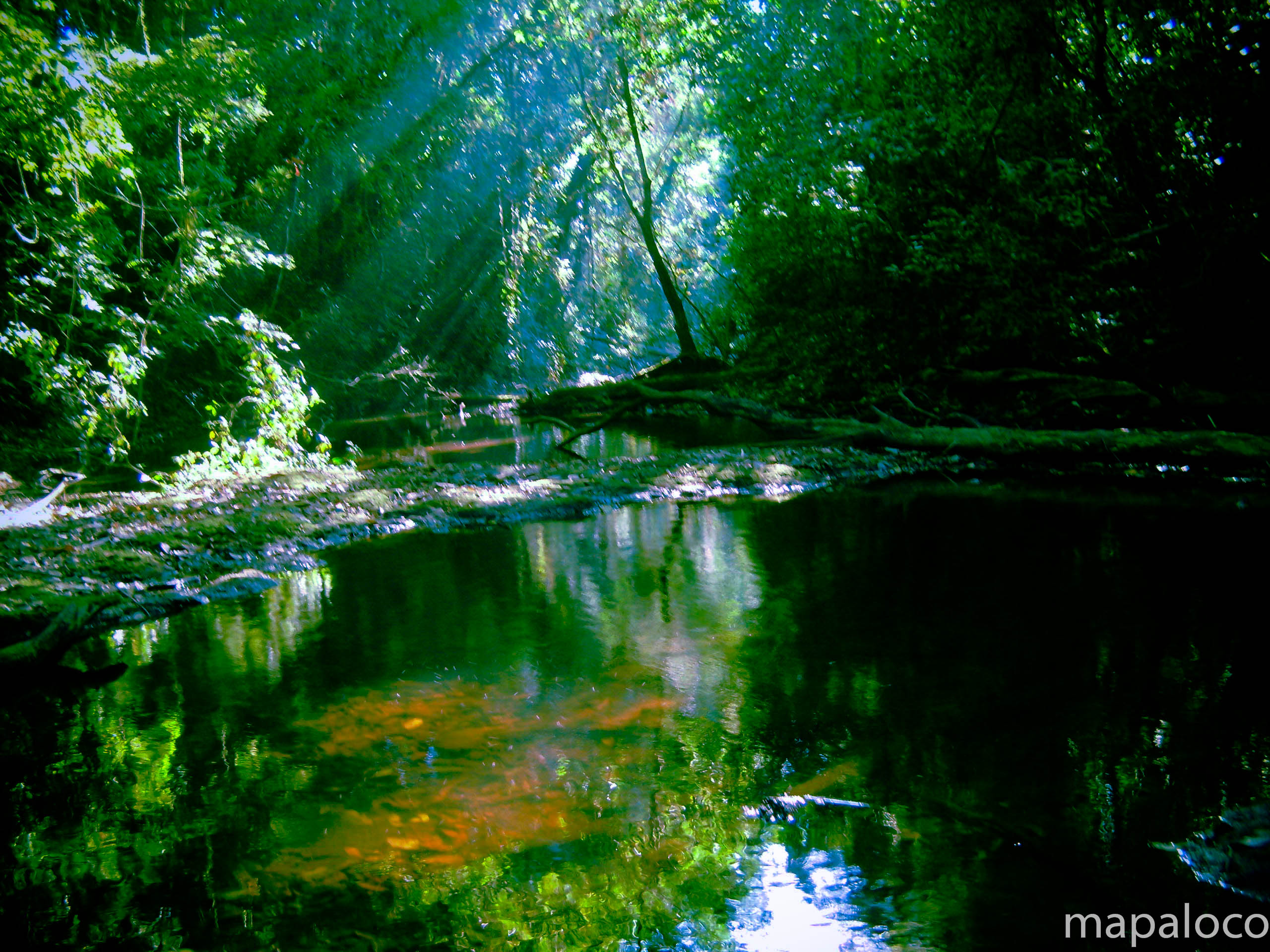 Río Susun, en la Finca Susun, Comunidad San Martín Yaoya, Prinzapolka, Raan, Nic.